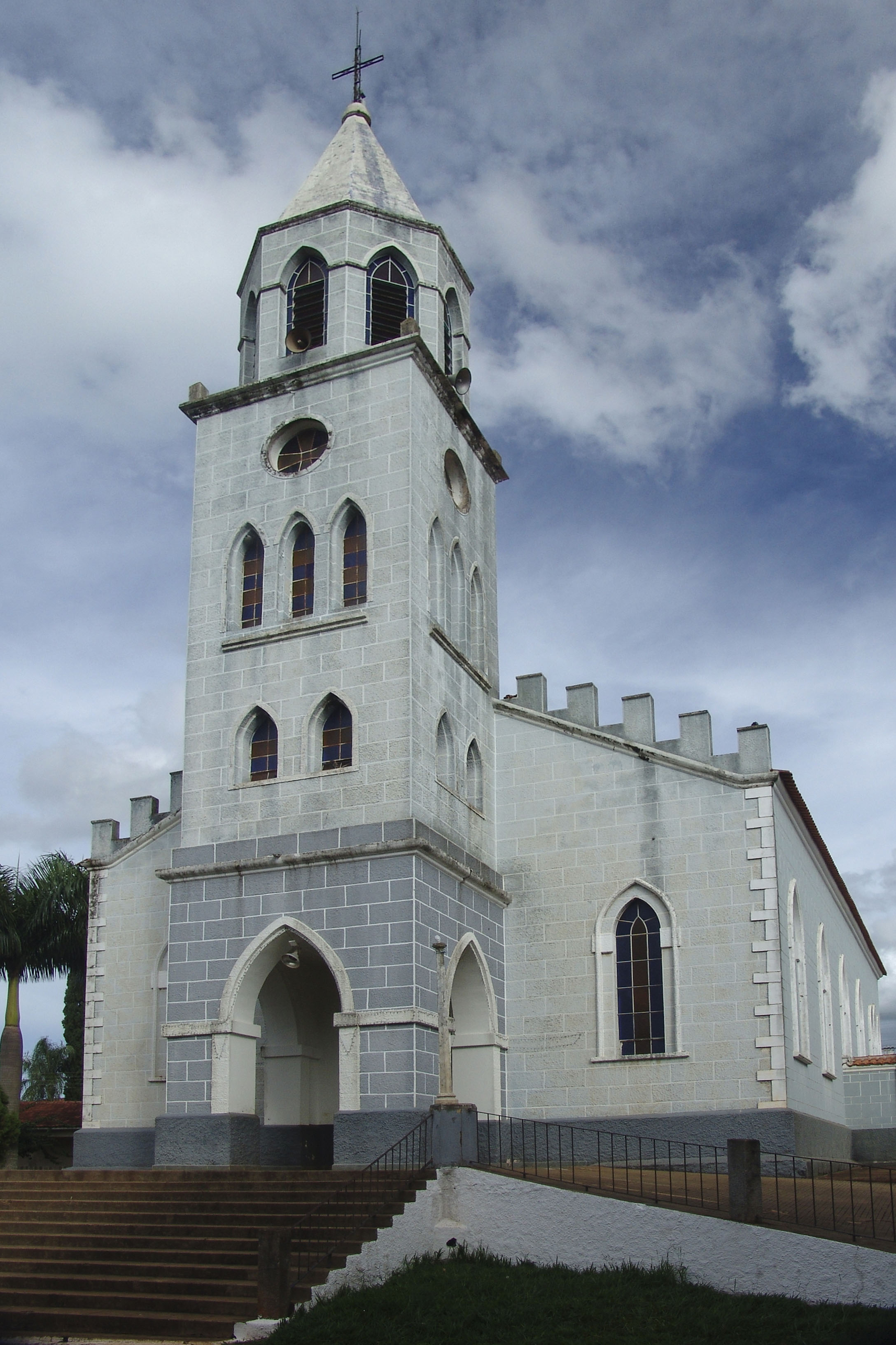 Igreja no município de Sarutaiá